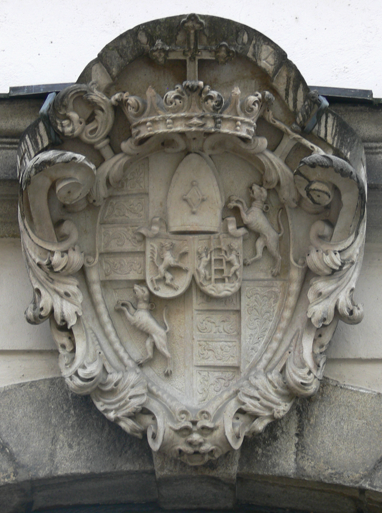 Passau, Justizvollzugsanstalt (ehem. Marstall), Wappen des Bischofs Johann Philipp Graf von Lamberg über dem Portal